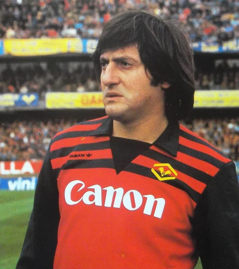 dirigente sportivo, calciatore e allenatore italiano